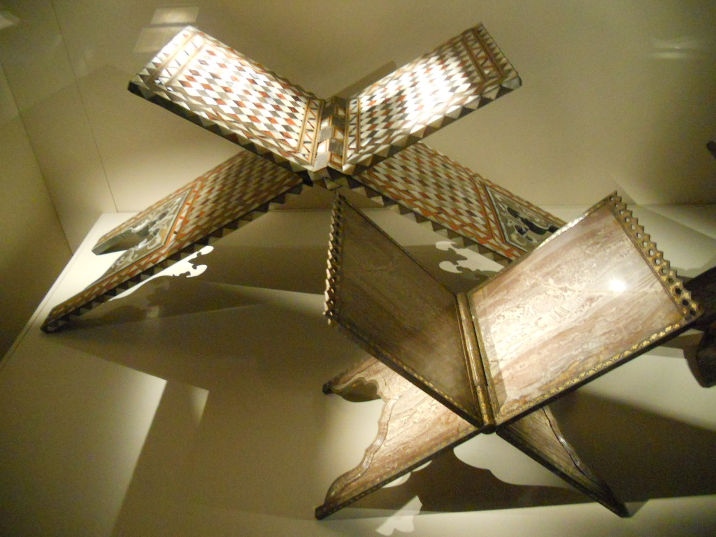 Koran Holders